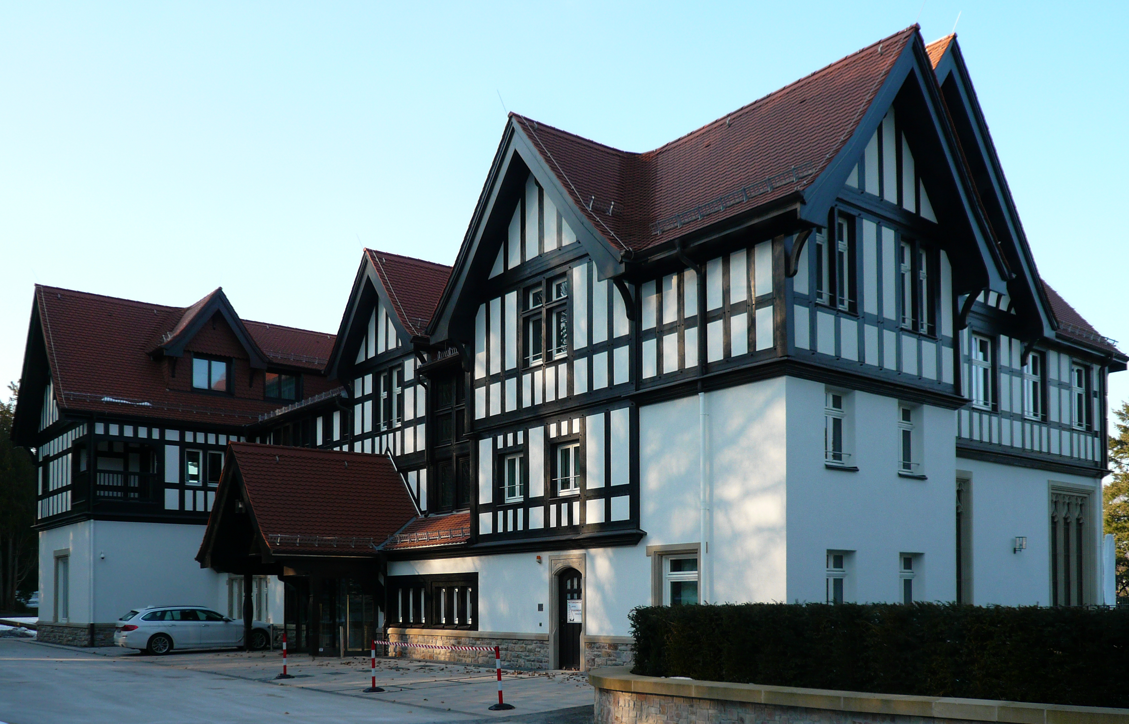 Oberursel denkmalgeschützte Gebäude Villa Gans am 22.02.2018